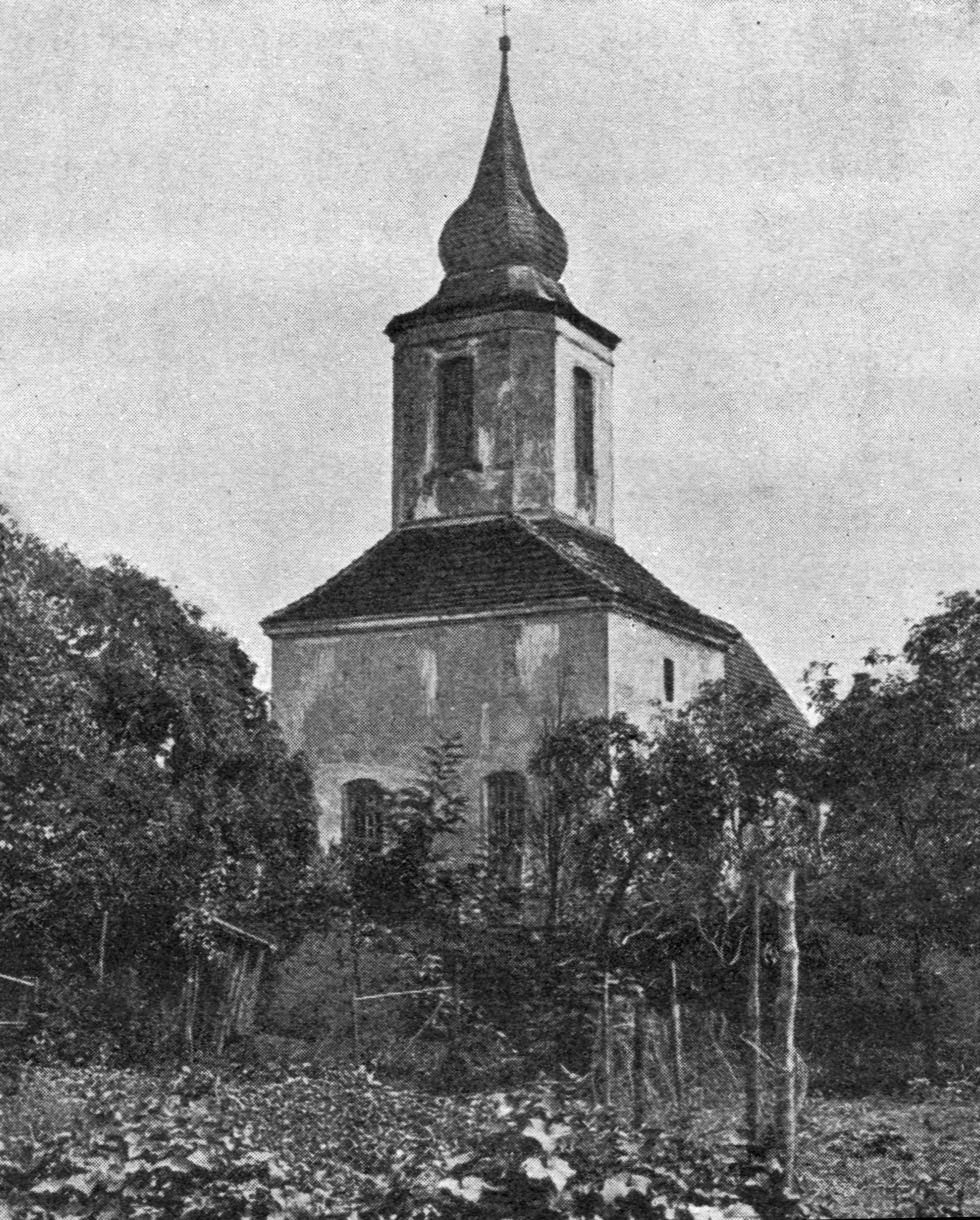 Kirche Würdenhain